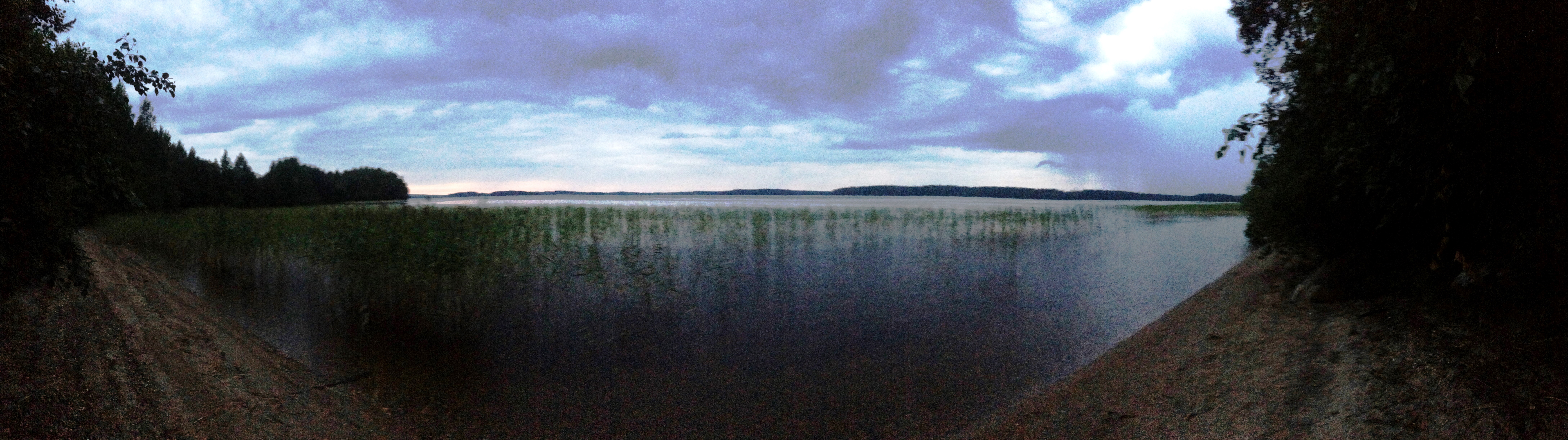 Совдозеро (озеро, Поросозерское сельское поселение, северо-восточное)